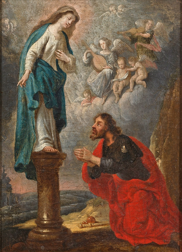 Betender Jakobspilger vor einer Mariensäule mit lebendig gewordener Skulptur; Süddeutsch, 18. Jh.; Öl auf Leinwand, 30 cm x 22 cm